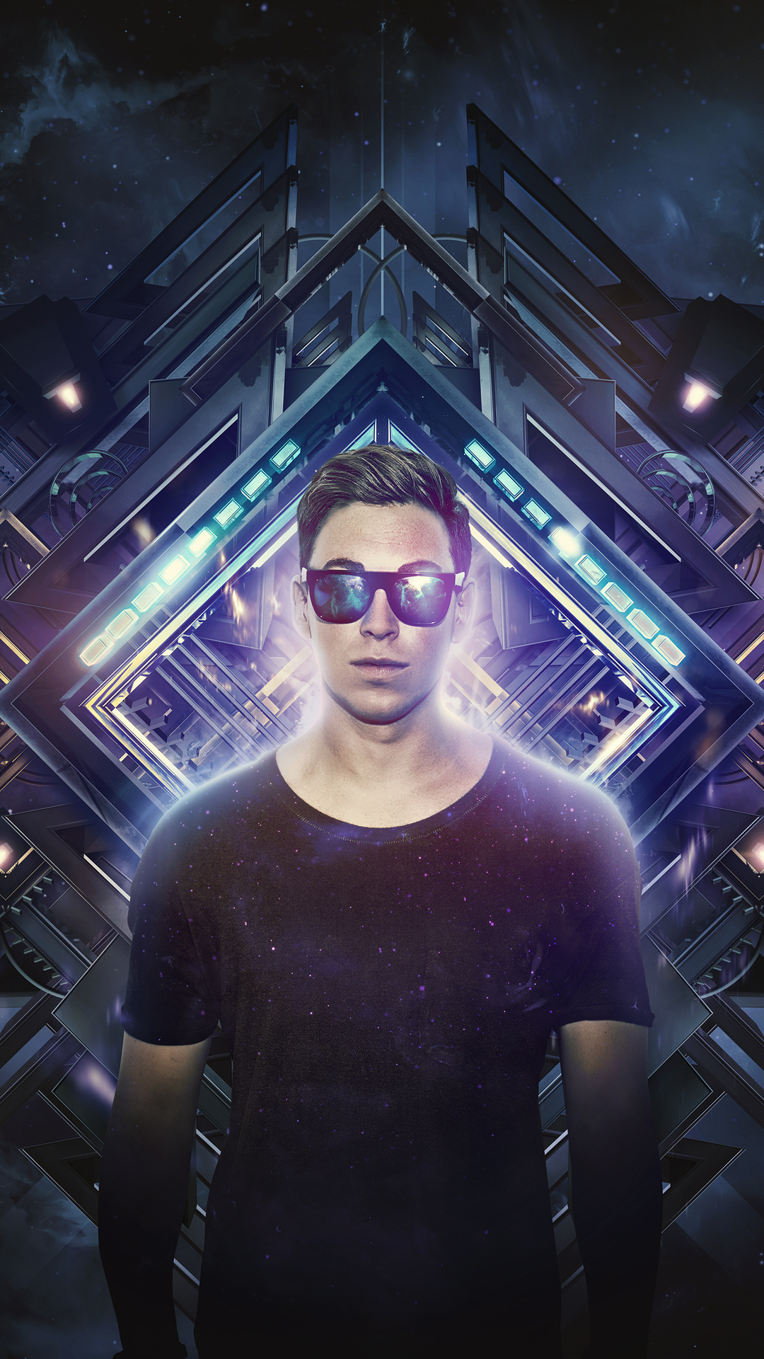 Esta es una fondo de pantalla de Hardwell.